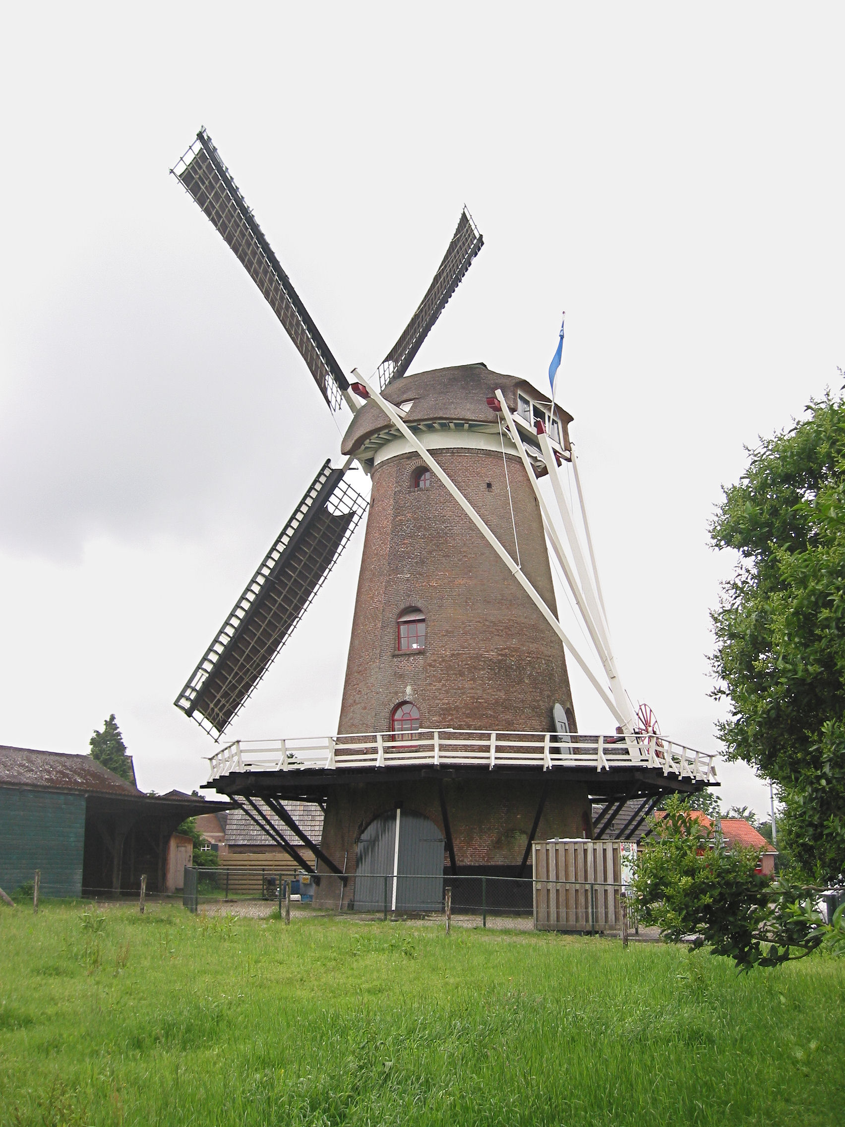 De Hoop in Garderen, Gelderland, the Netherlands